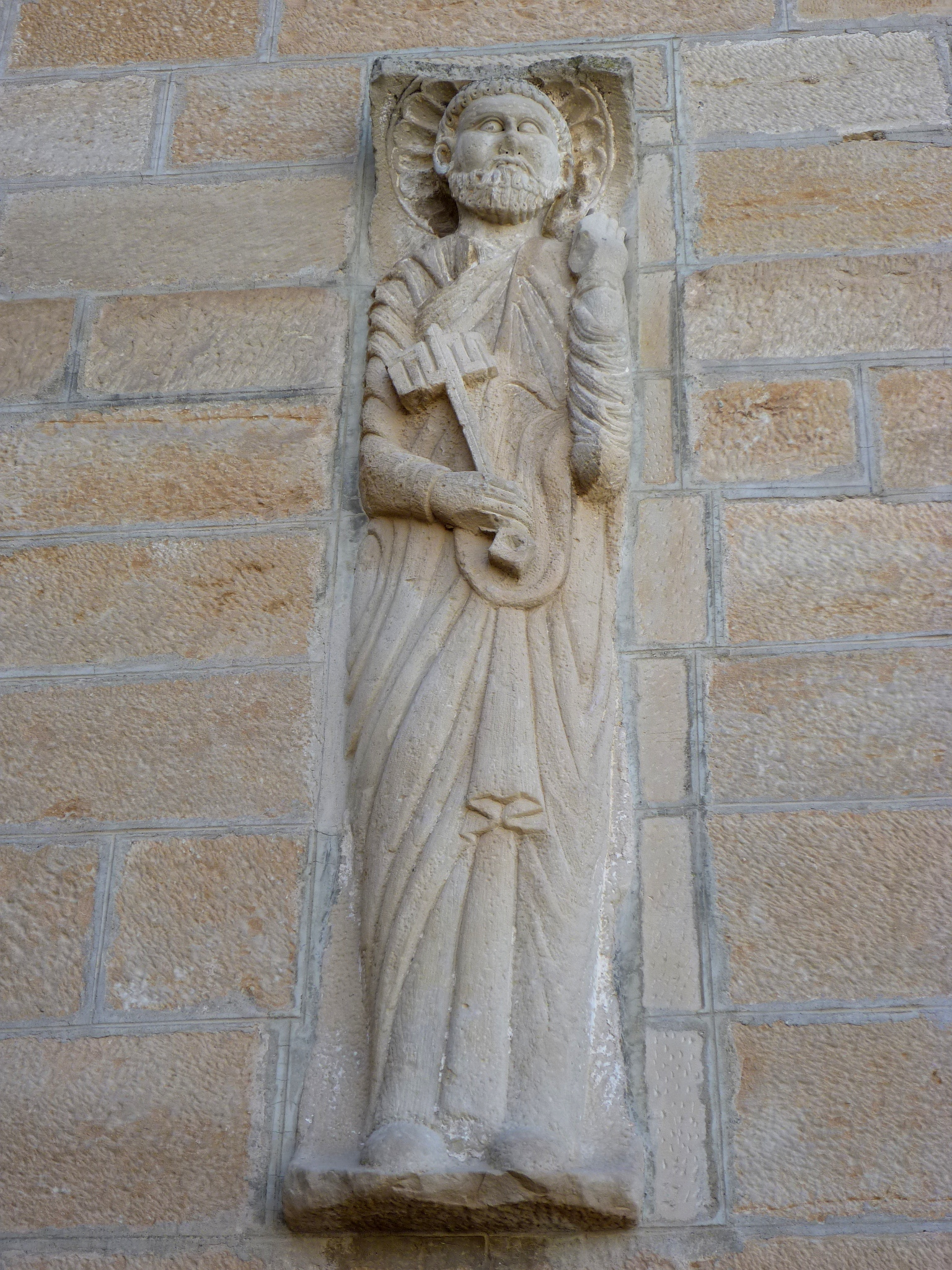 Església de Sant Pau de Narbona (Anglesola): escultura a la façana de ponent